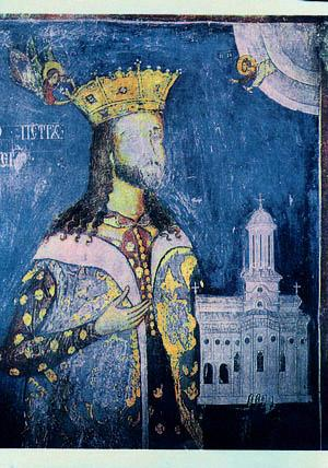 Radu Paisie